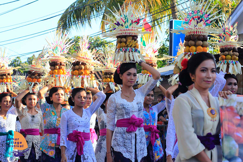 Parade Budaya SVF 2017